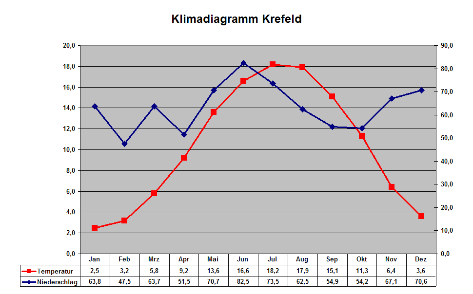 Bildbeschreibung: Klimadiagramm Krefeld Quelle: selbst erstellt Datum: 1.04.2006 Fotograf/Zeichner: DER UNFASSBARE